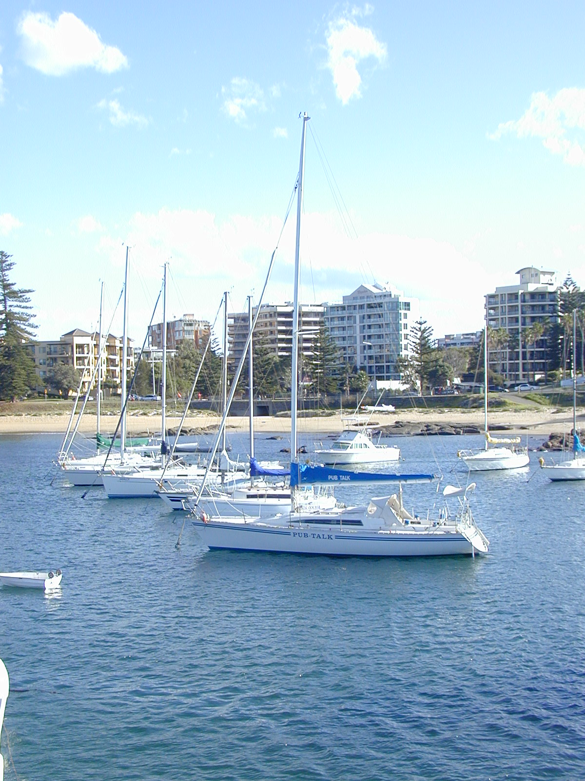 Wollongong harbor